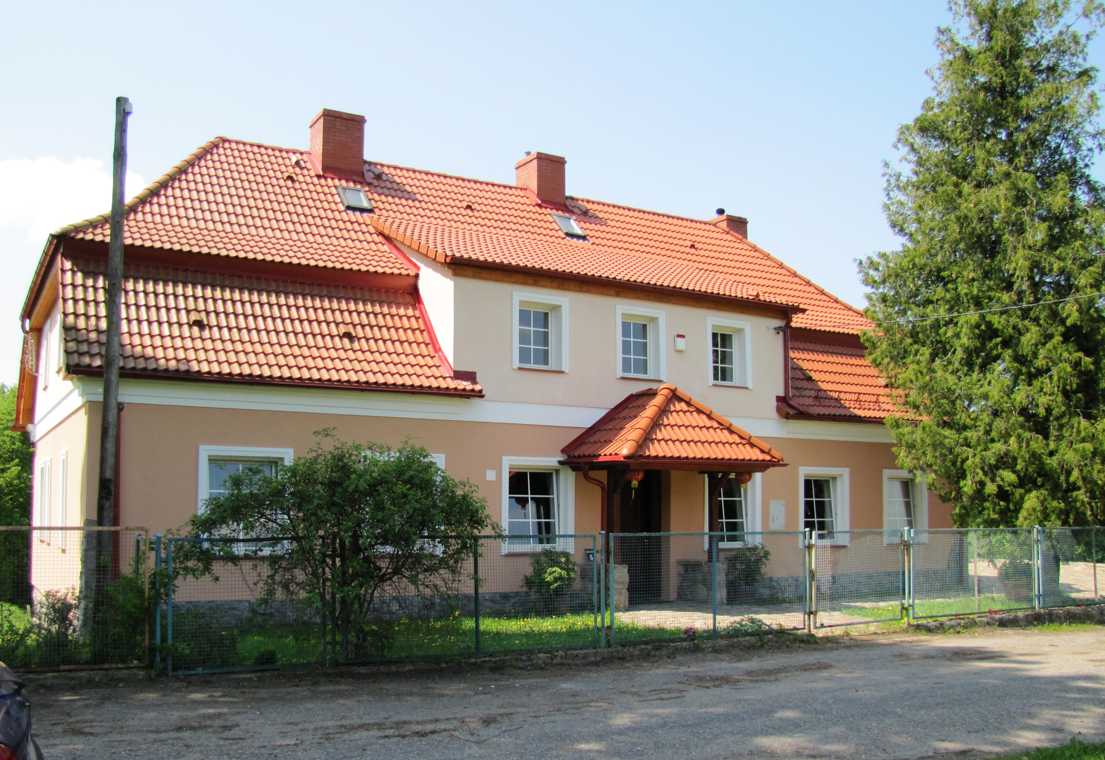 Budynek byłej Szkoły Podstawowej.